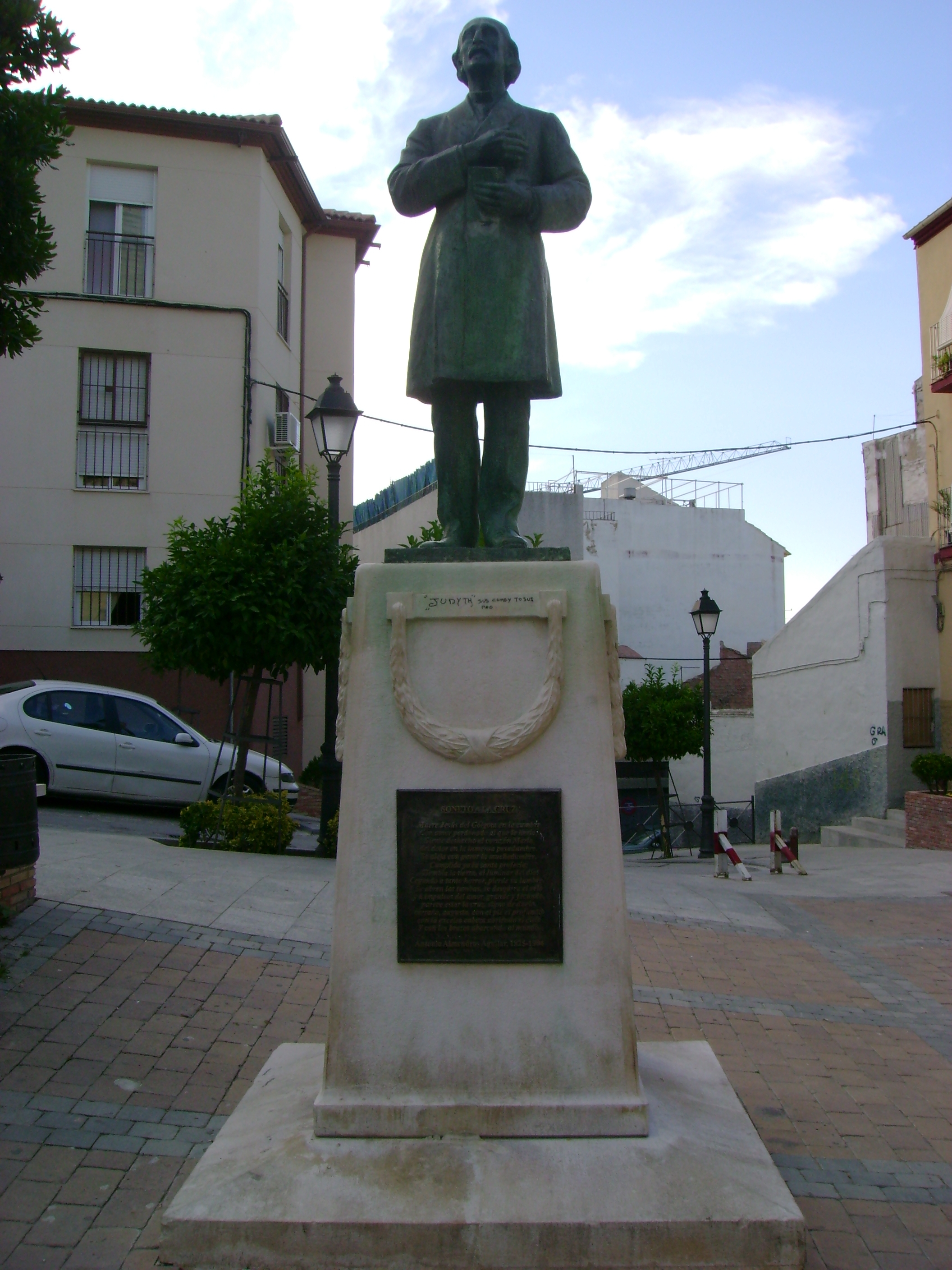 Estatua de Antonio Almendros Aguilar, en Jaén.